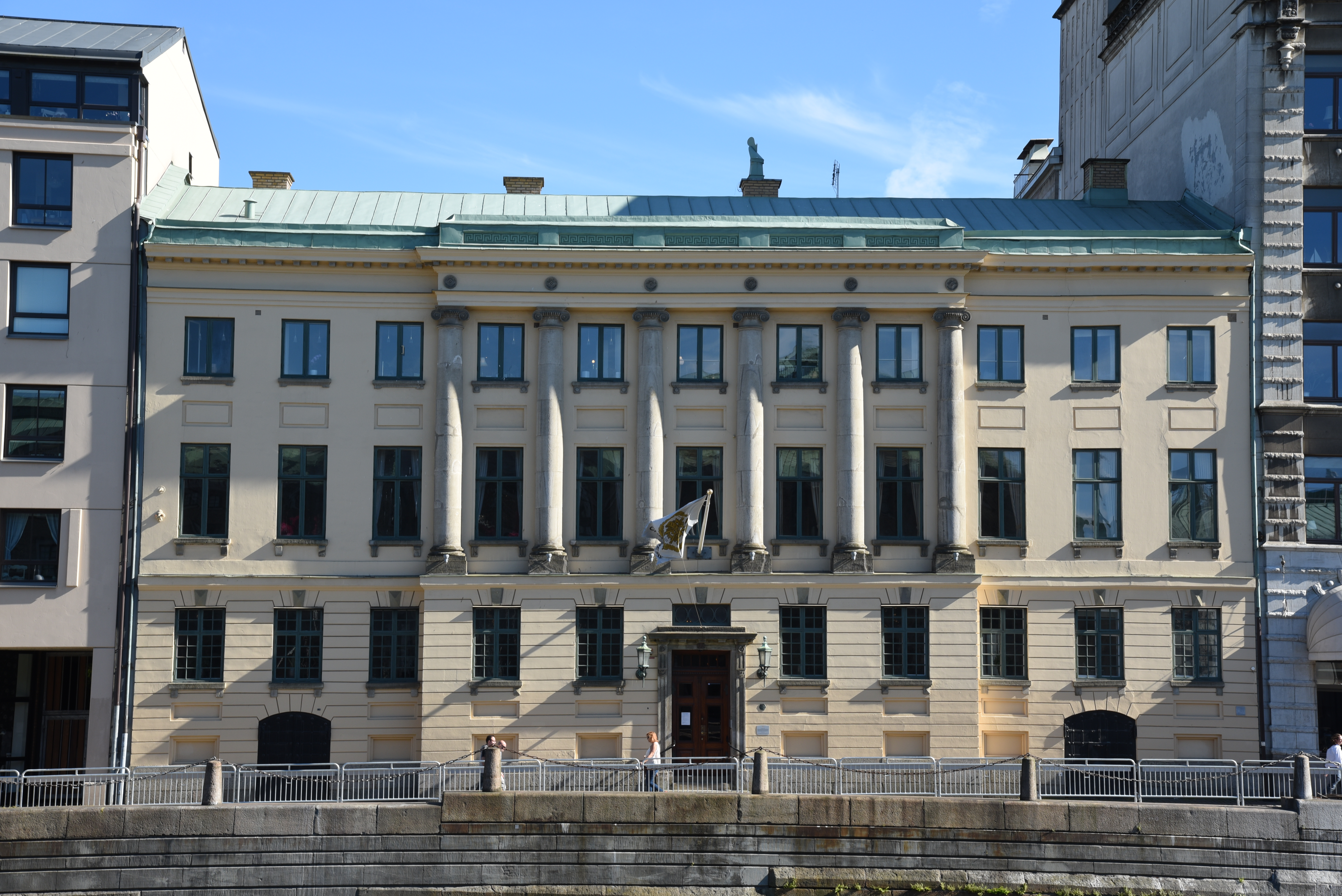 Chalmerska huset vid Södra Hamngatan 11, kvarteret Kommerserådet, i stadsdelen Inom Vallgraven i Göteborg.